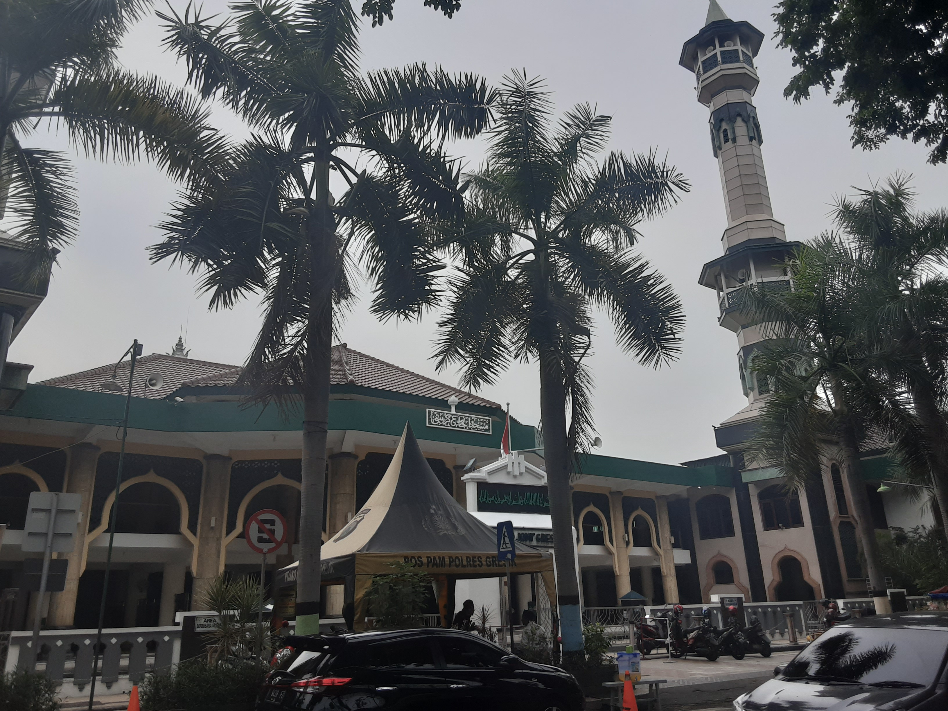 Halaman teras dan luar Masjid Jami' Gresik